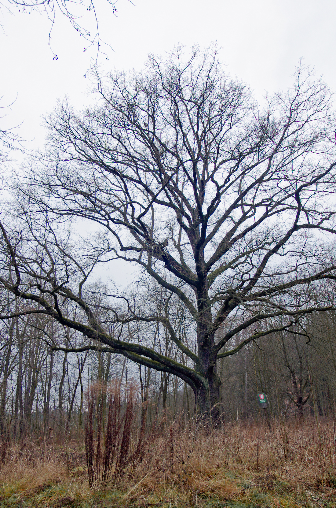 památný strom - Zámecký dub v Chlumku, okres Sokolov